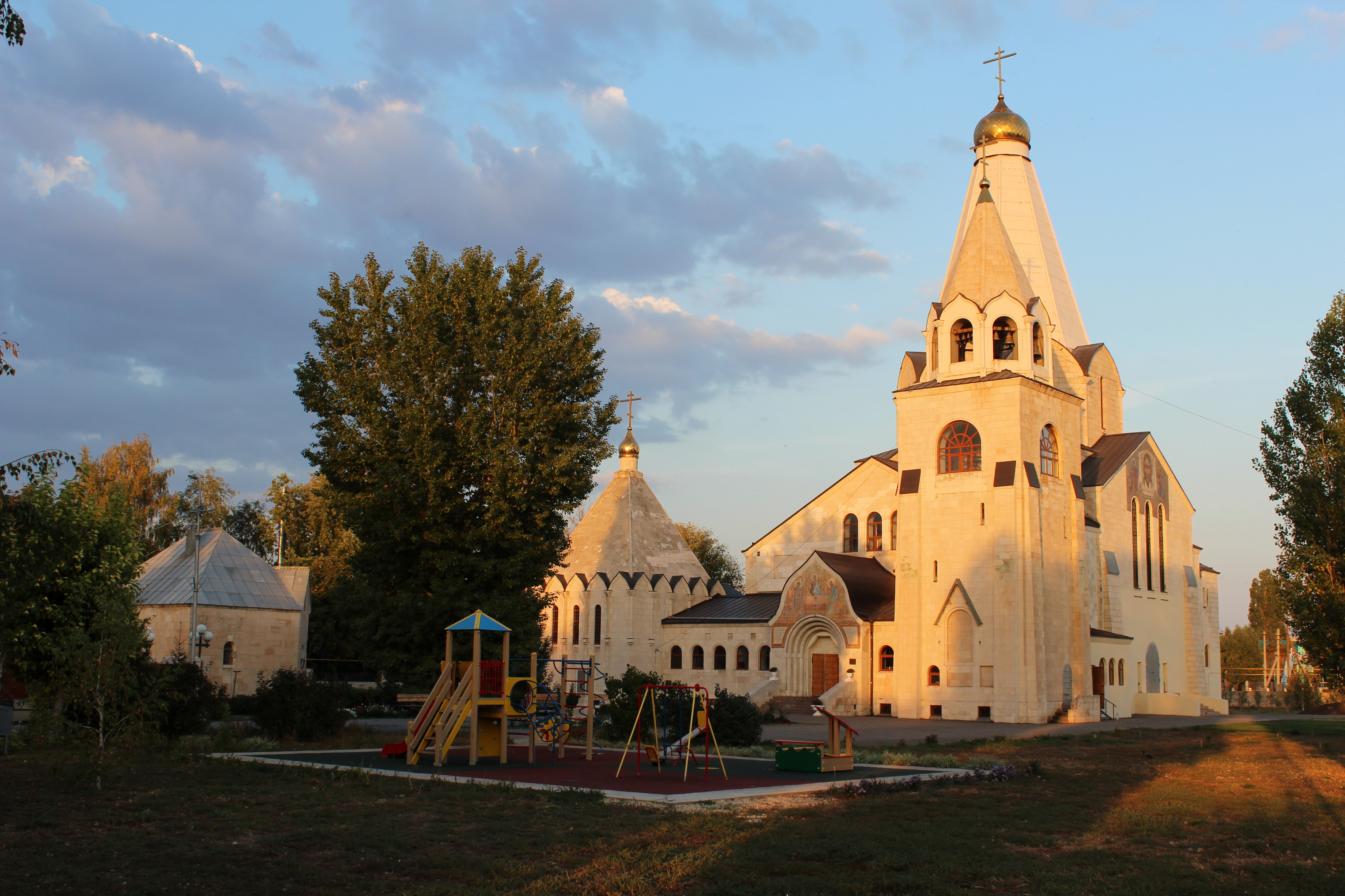 Церковь Пресвятой Троицы: улица Ленина, 1, Балаково, Саратовская область